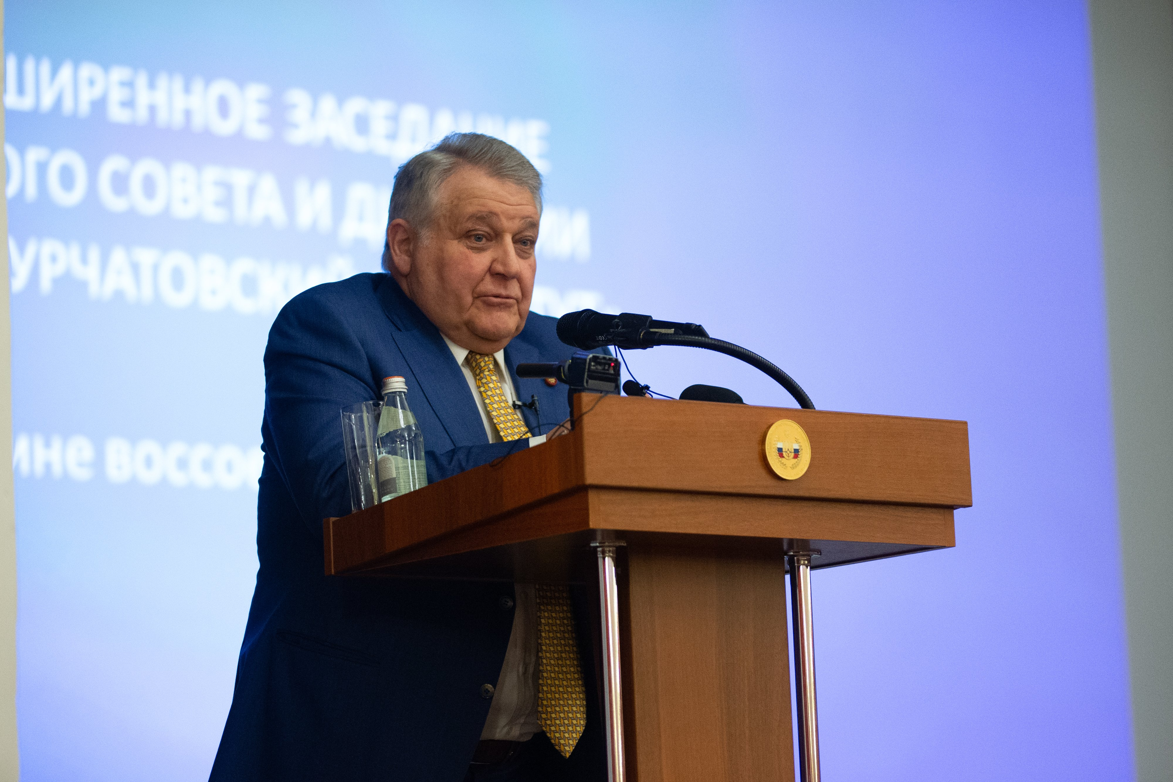 Михаил Валентинович Ковальчук (род.1946) — российский физик, член-корреспондент РАН